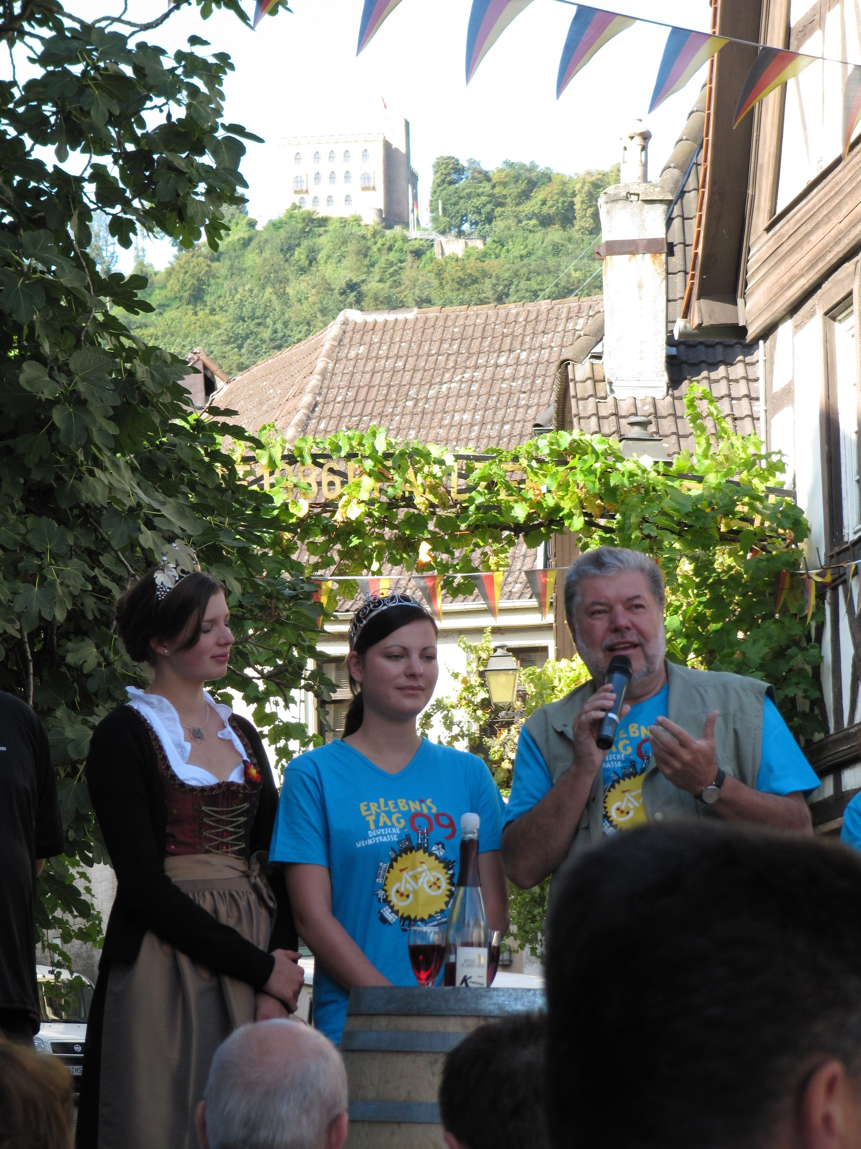 Eröffnung des Erlebnistages 2009 durch Kurt Beck, Patricia Frank und Christine Freund in Neustadt-Hambach